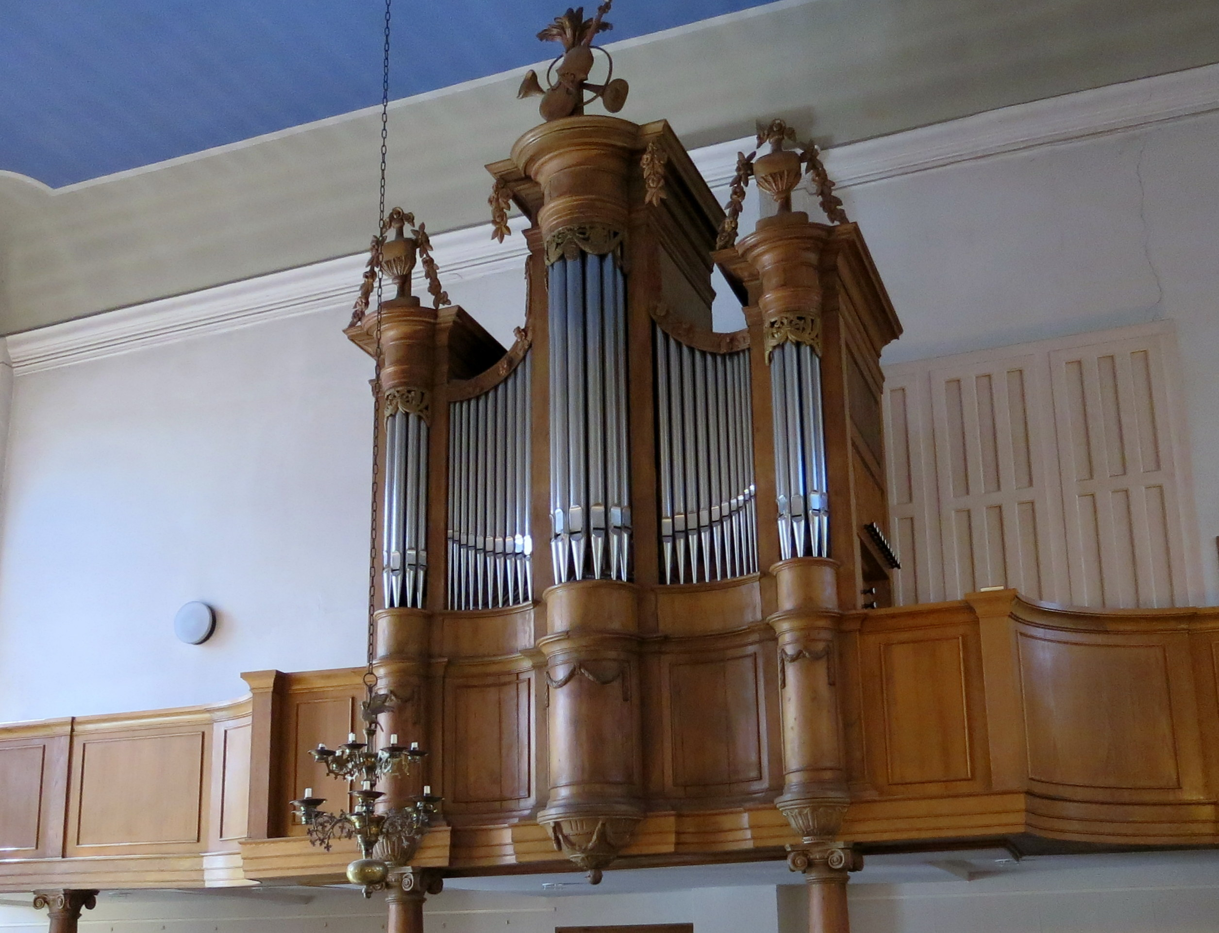 Das ist die Orgel der evangelisch-reformierten Kirche in Xanten